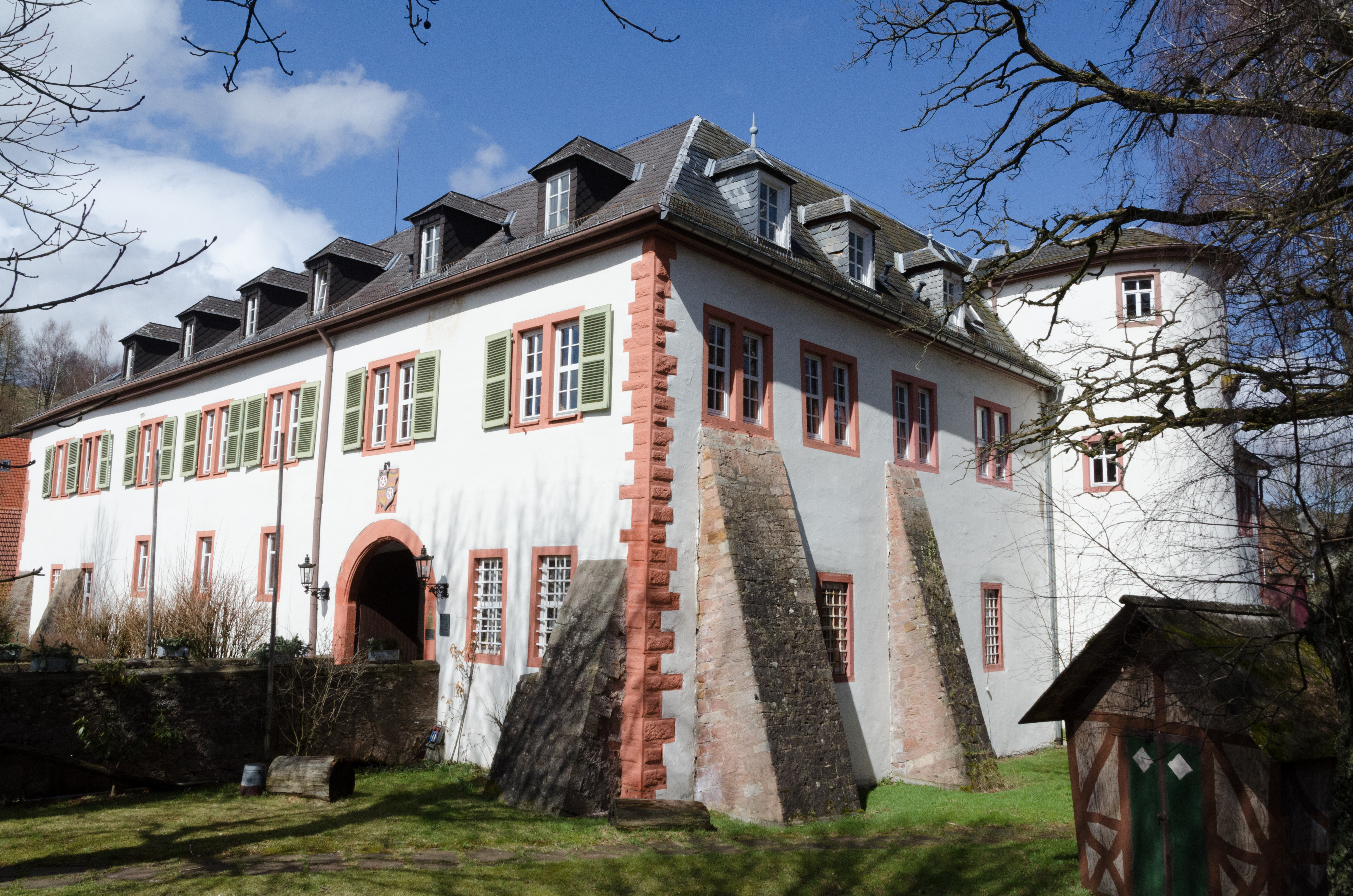 Rothenbuch, Schloss